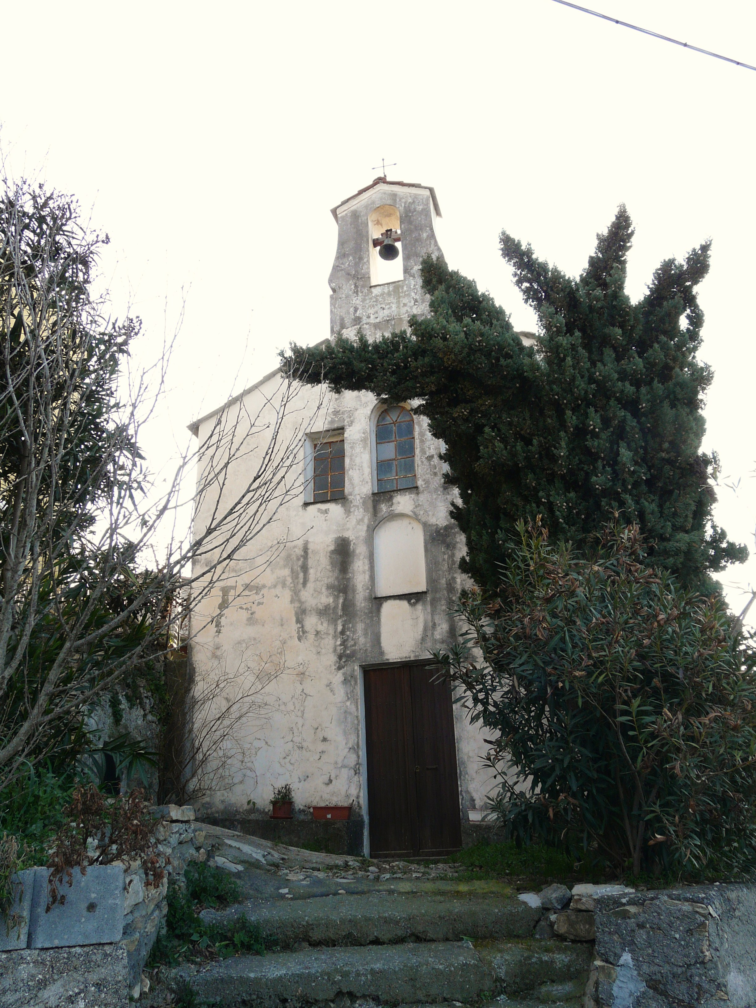 Centro storico della borgata Castello, Chiusanico, Liguria, Italia